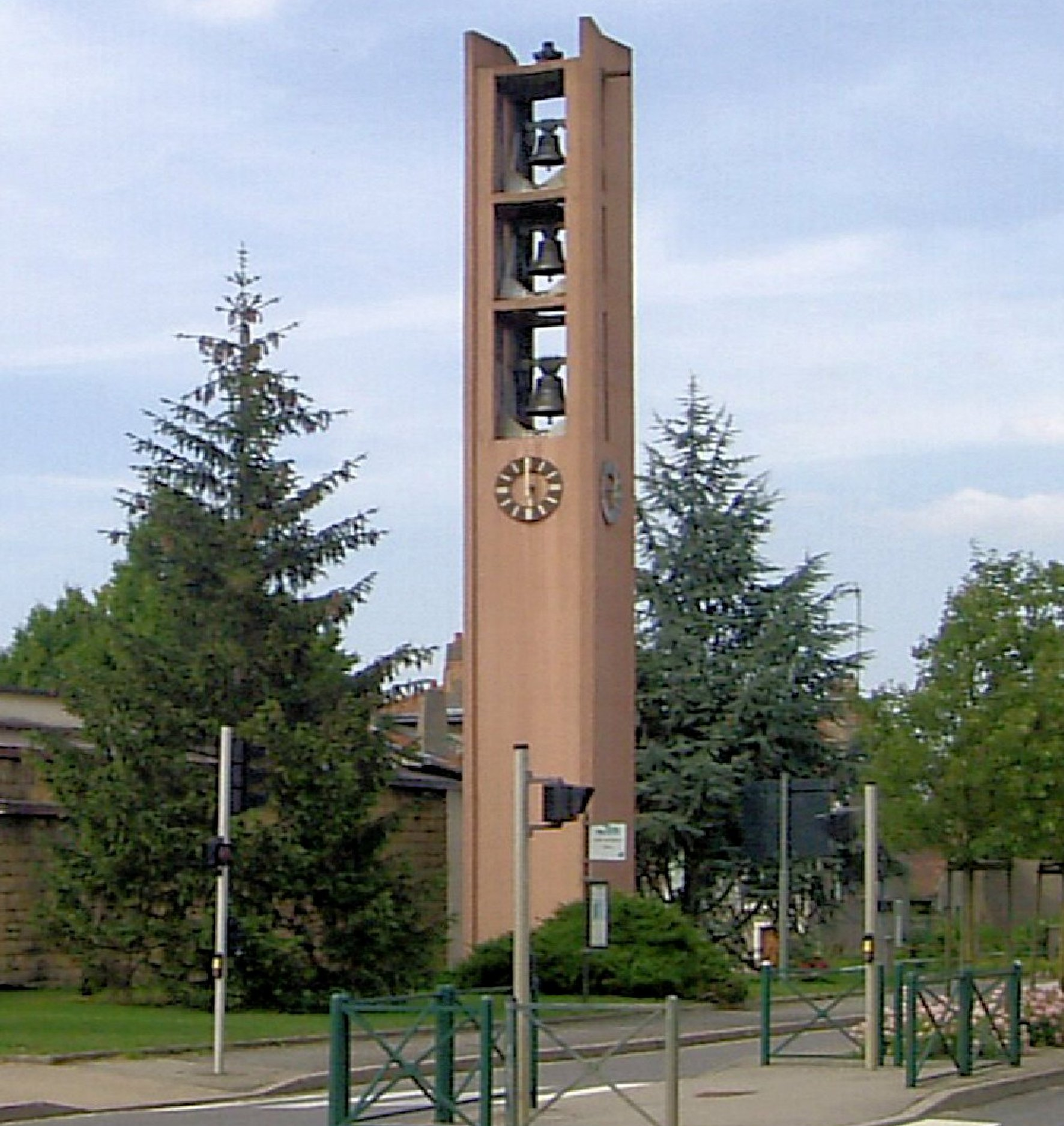 Clocher d'église Saint-Martin á Corny-sur-Moselle (d'avant-garde 1960, architectes Pingusson et Prillien)